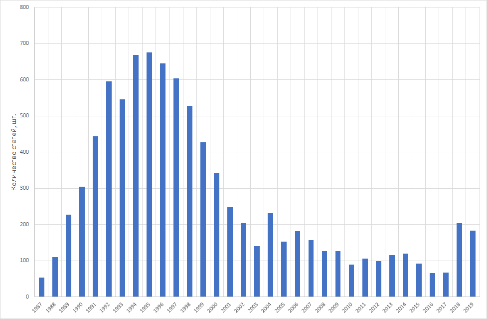 График, составленный на основе автоматической выдачи базы данных PubMed NCBI.